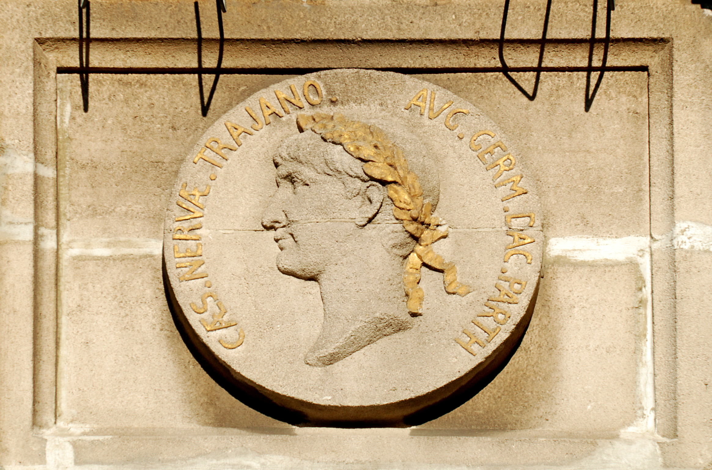 Belgique - Bruxelles - Grand-Place - Maison du Roi d'Espagne